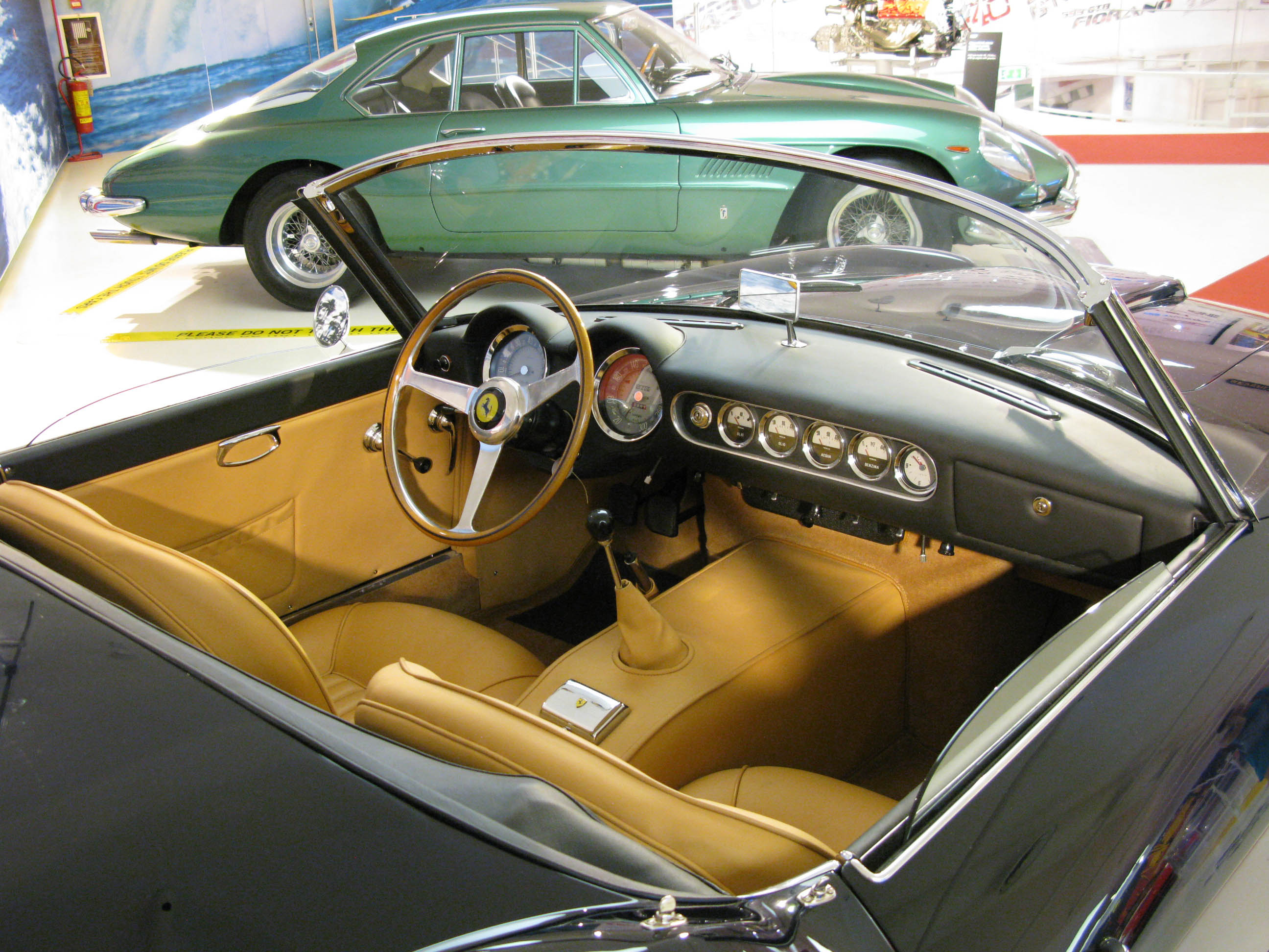 Ferrari 250 GT California Spyder